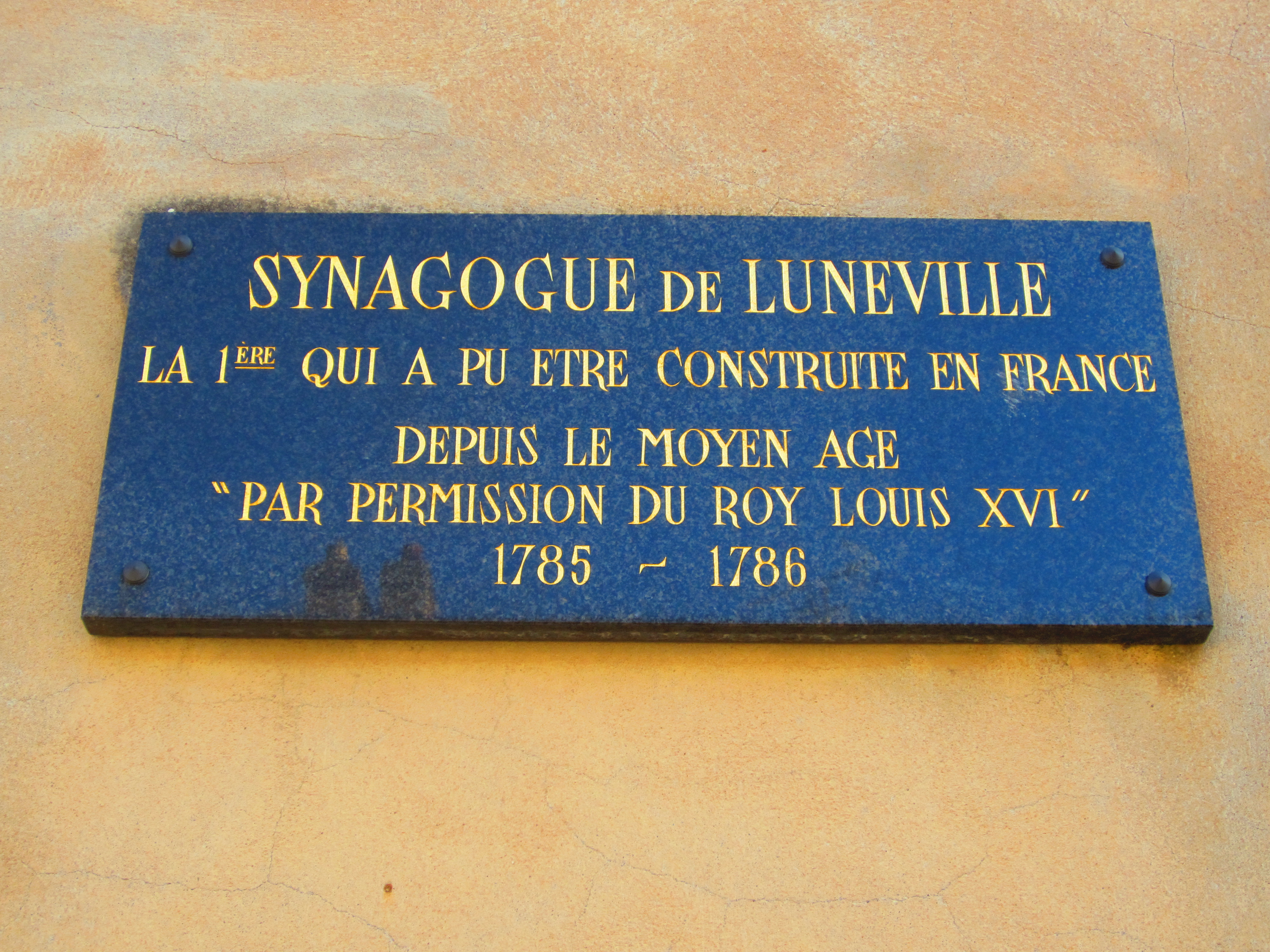 Luneville synagogue (10)